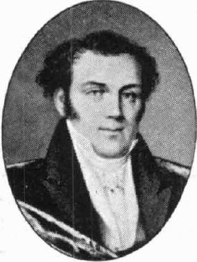 Johan Daniel Ahlberg (1793-1856), svensk läkare